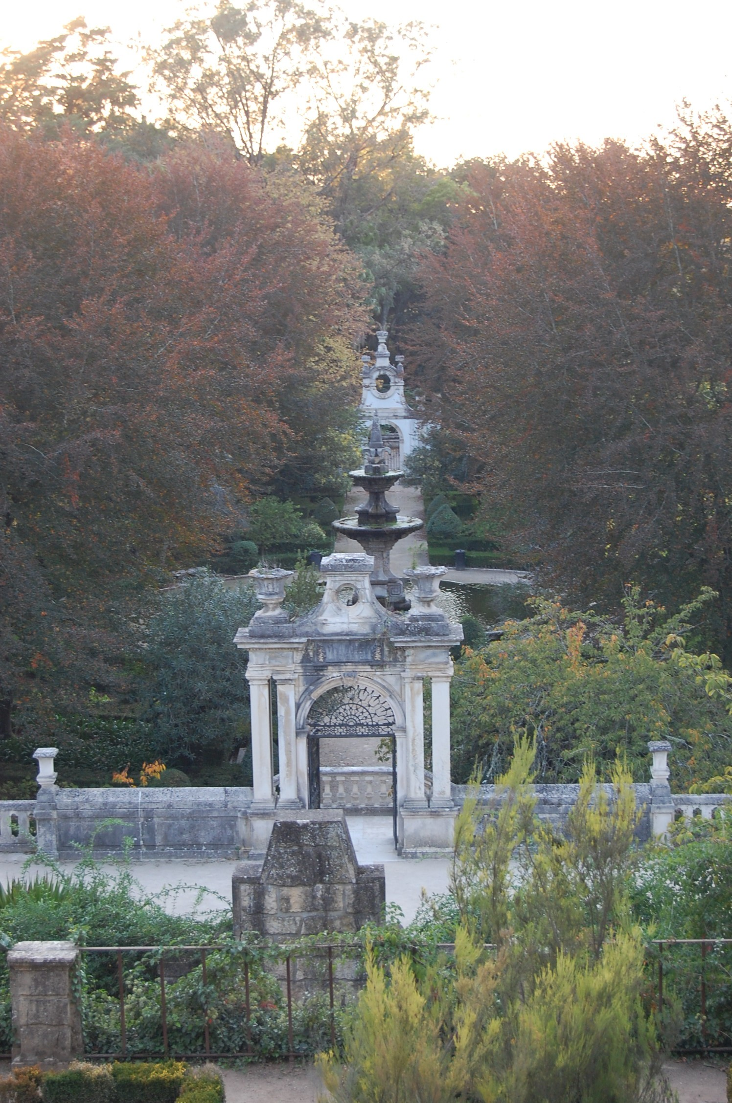 Jardim botânico de Coimbra.